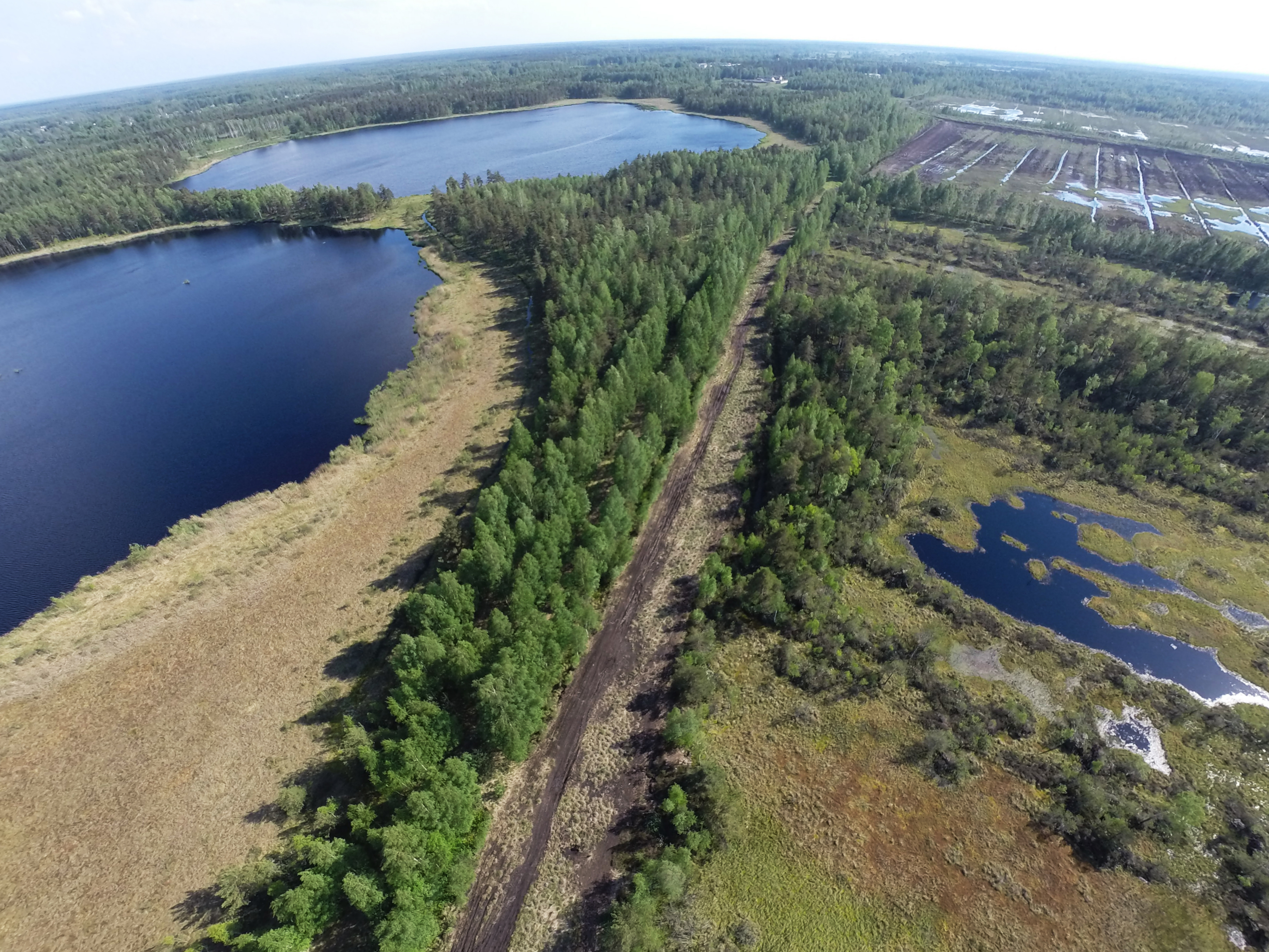 Stunīšu ezers- aero photo